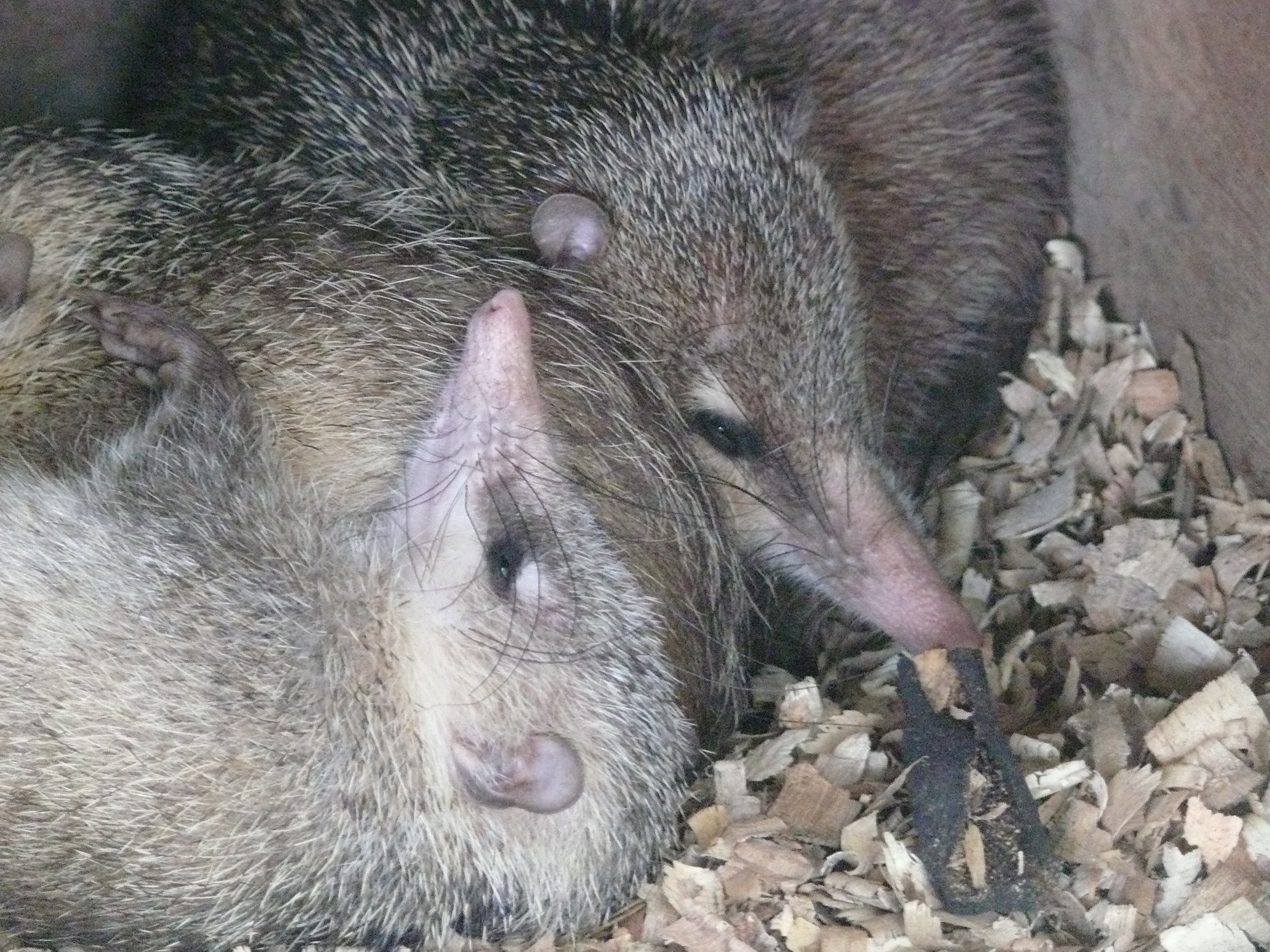 Des tenrecs